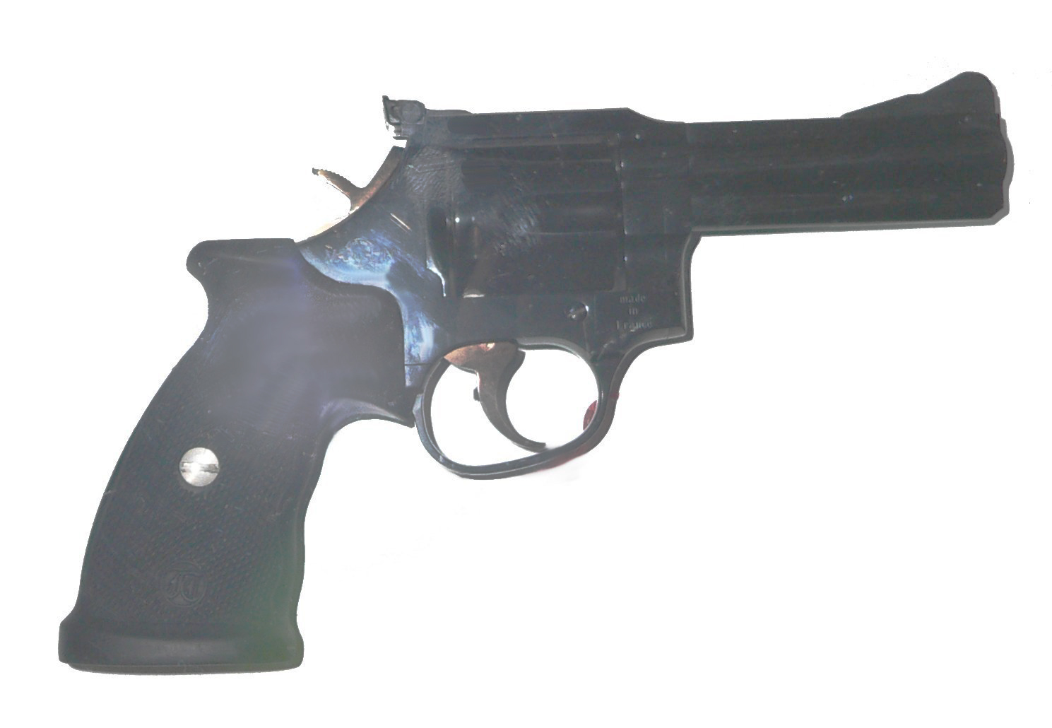 Revolver Manurhin MR 73, calibre .357 Mag